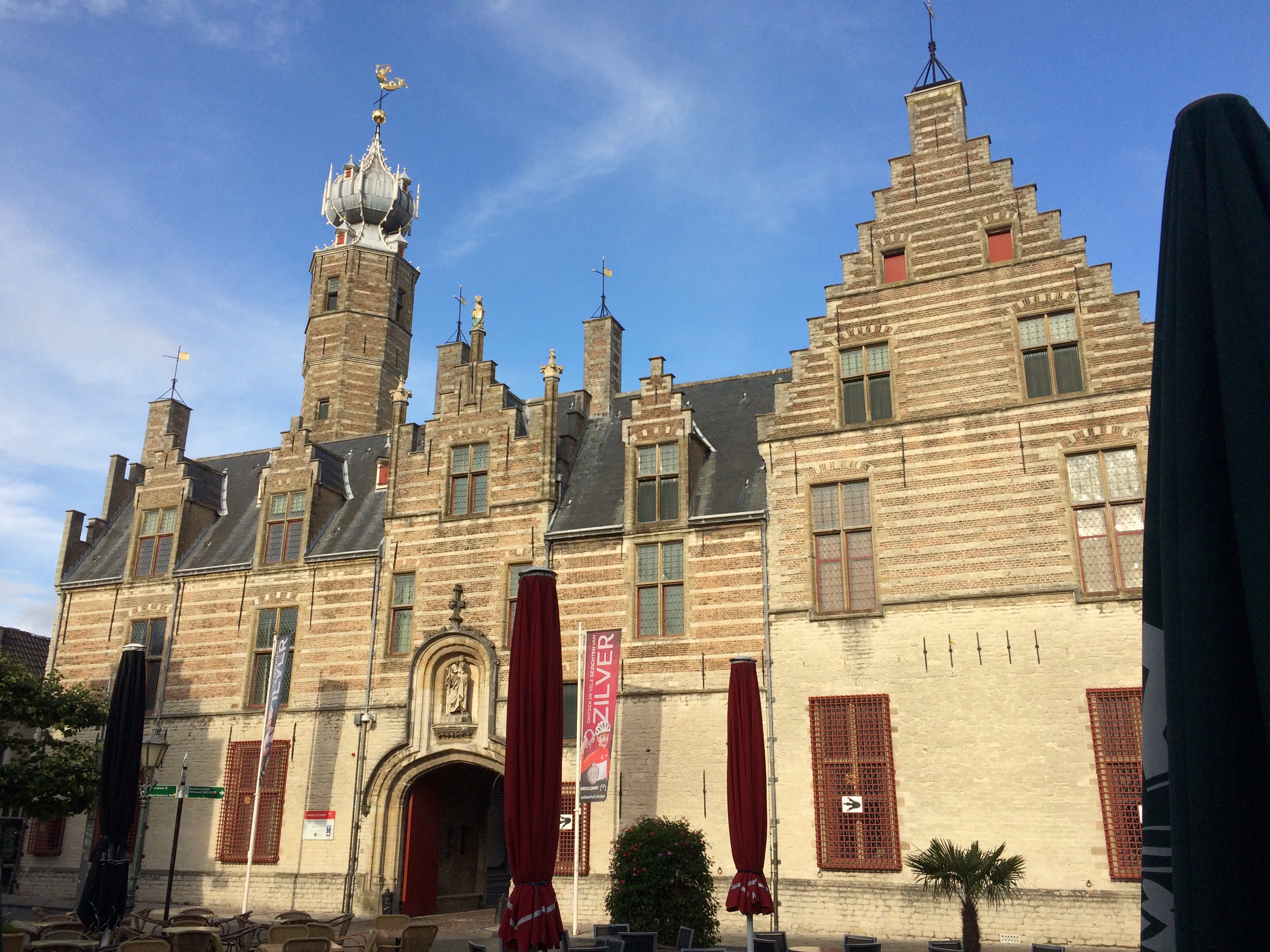 Vooraanzicht van 't Markiezenhof vanaf het Beursplein, Bergen op Zoom.